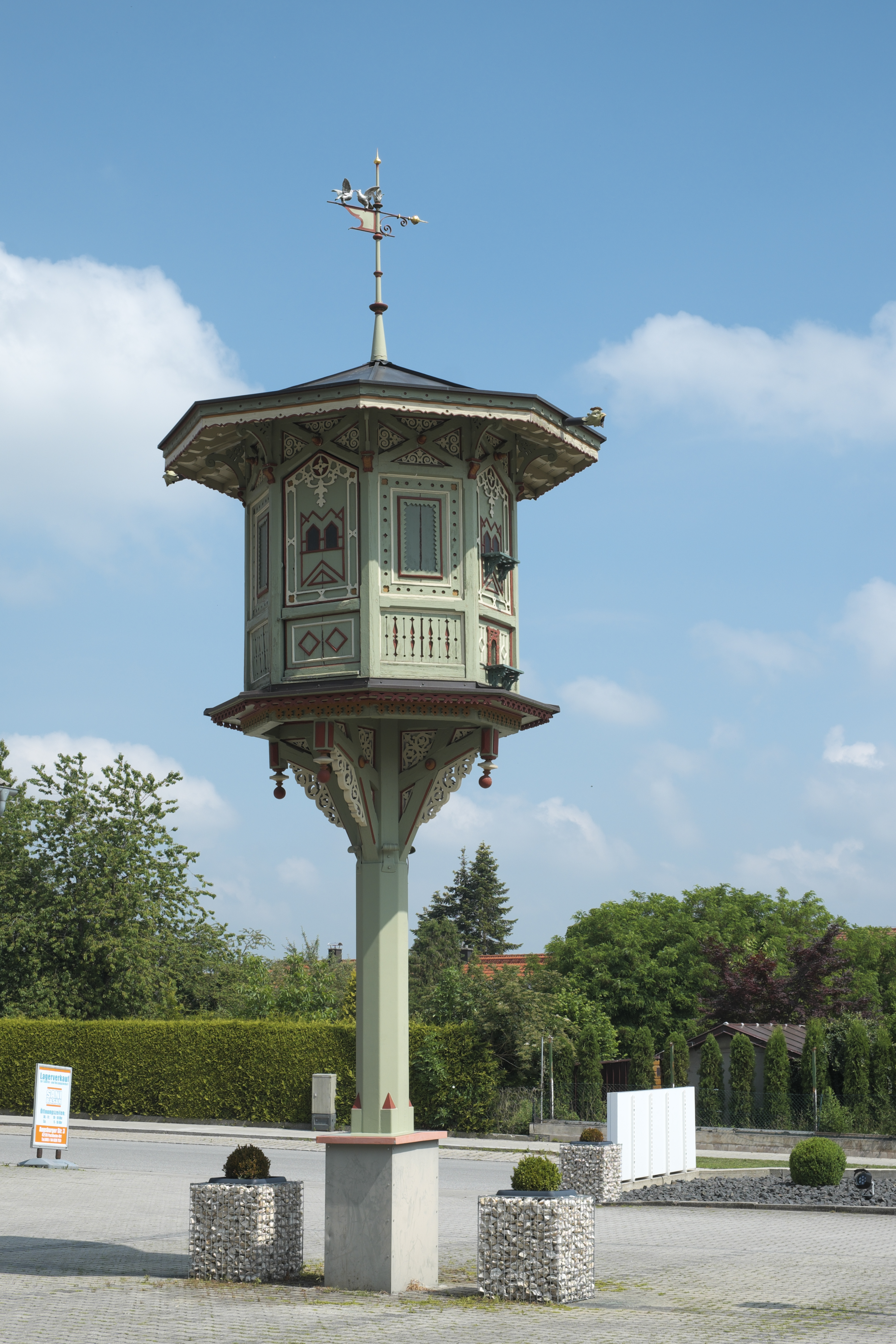 Taubenkobel (in Puchheim im Landkreis Fürstenfeldbruck (Bayern/Deutschland)